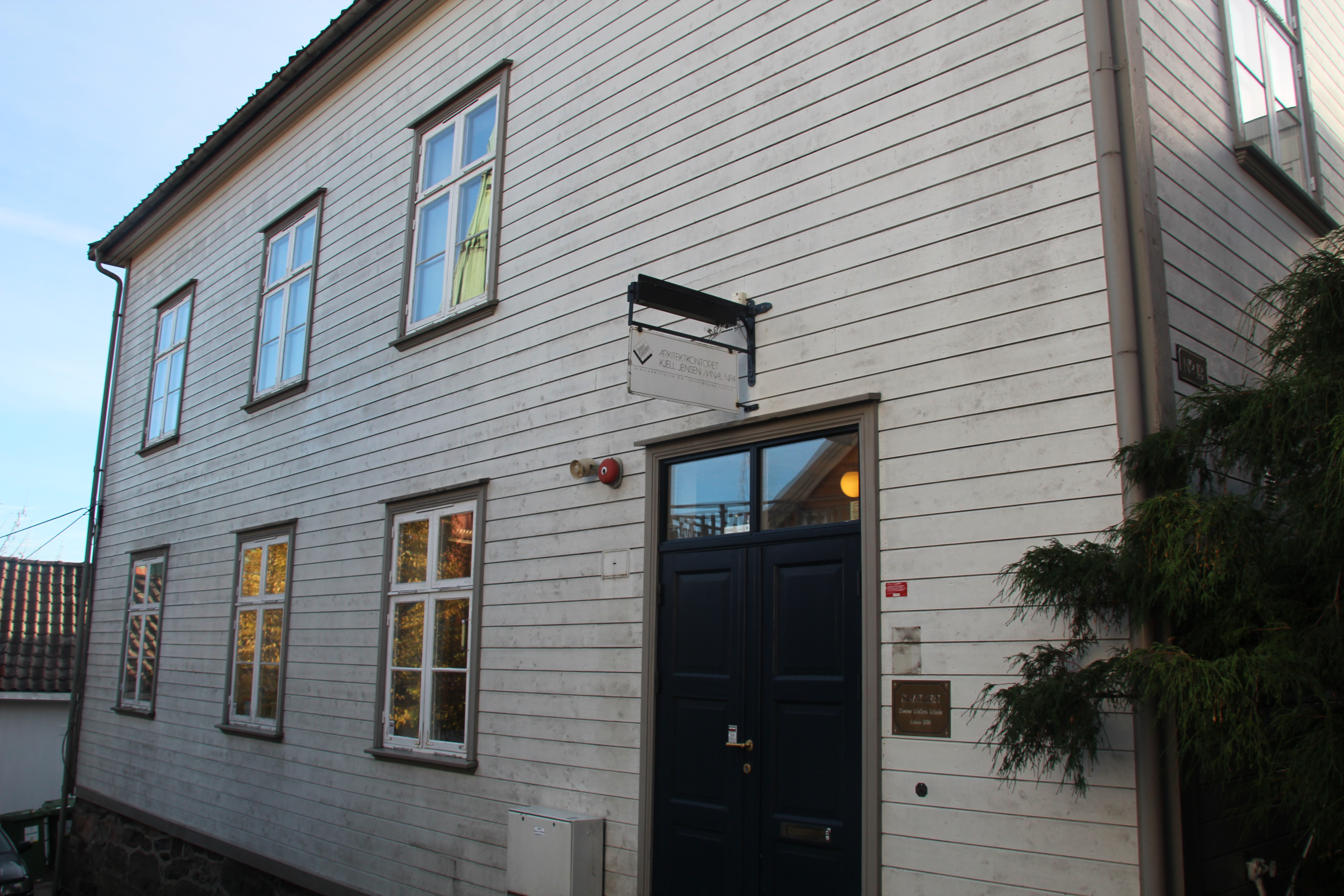 Sløyden i Arendal